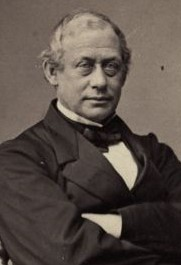 Frederik Stang (1808 - 1884), Norwegian Prime minister 1861-1880